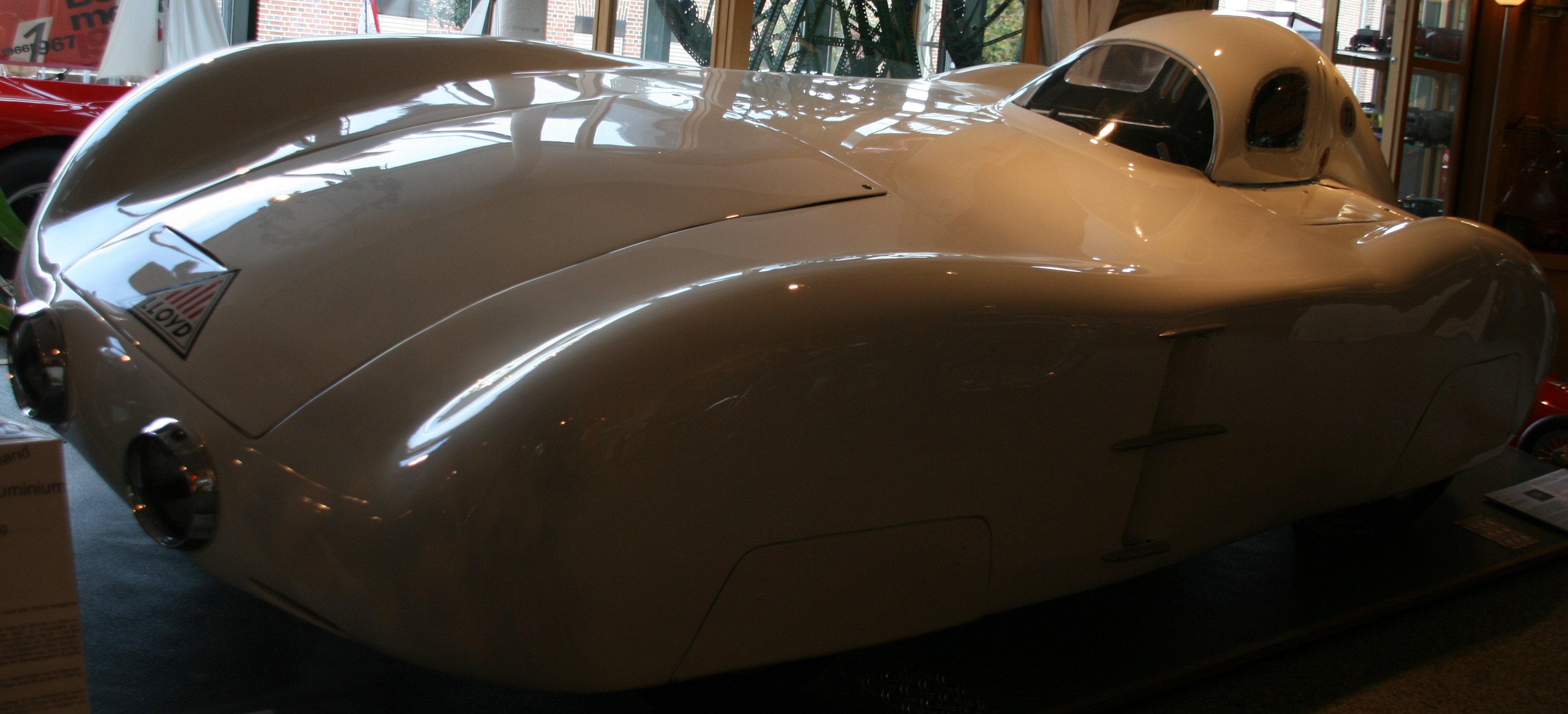 Lloyd Weltrekordwagen im Boxenstop Tübingen